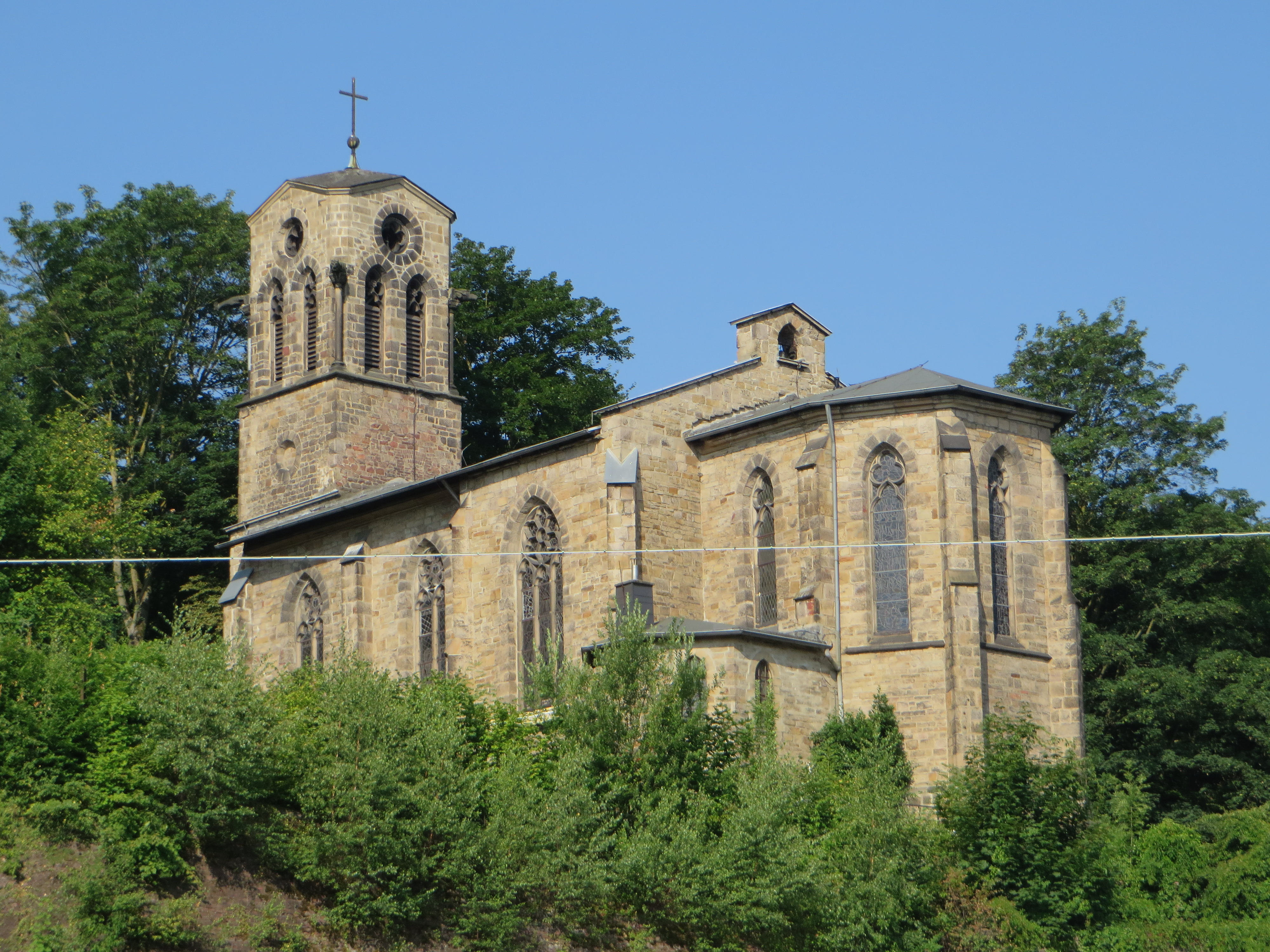 Denkmalgeschützte alt-katholische Auferstehungskirche in Hagen-Mitte, Elfriedenhöhe, am Eingang zum Stadtgarten. Weihe 1877; älteste alt-katholische Kirche Deutschlands. Heute gehört die griechisch-orthodox genutzte Kirche zur alt-kath. Gemeinde St. Martin in Dortmund. This is a photograph of an architectural monument.